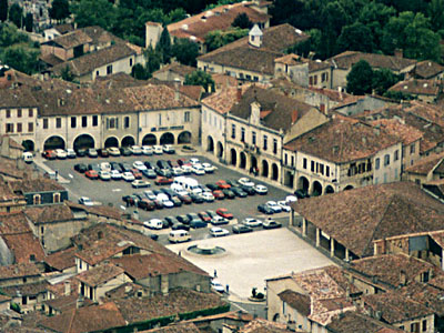 Photo de la place centrale de Mauvezin - Vue aérienne Alain Robert